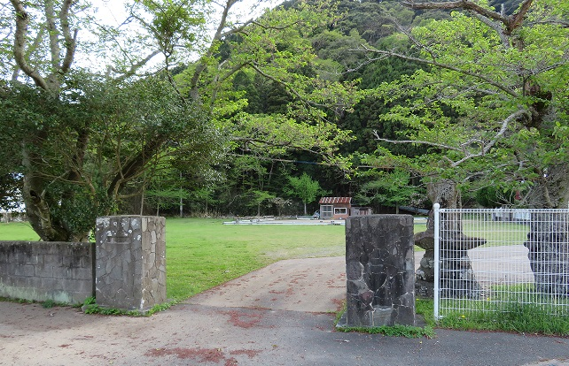 旧・峰町立吉田小学校（対馬市）